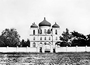 Беларуская (тарашкевіца): Дубна (Dubna). Царква